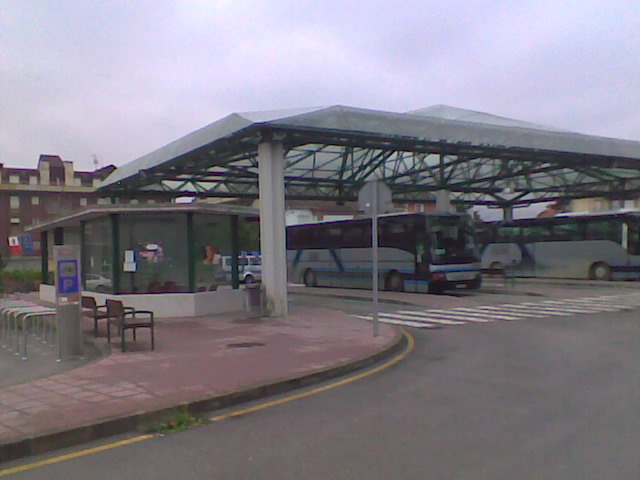 Estacion de Autobuses de Saron - Santa María de Cayón , Cantabria, España. Construida por la Consejeria de Transportes del Gobierno de Cantabria.